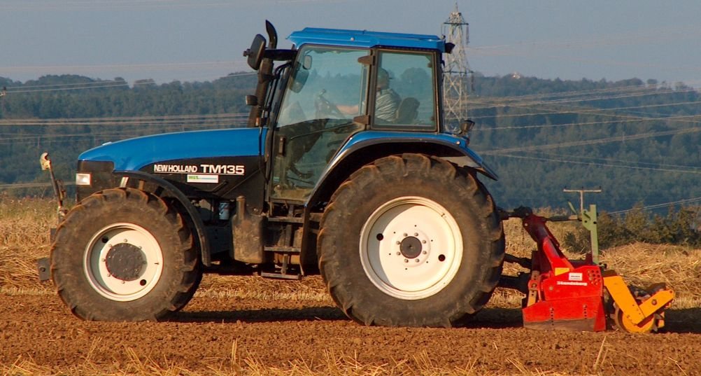 New-Holland-Traktor TM135 mit Fräse